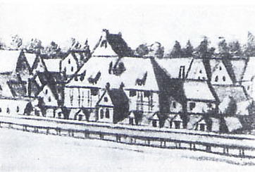 Das Opernhaus am Gänsemarkt (Ausschnitt aus einer Stadtansicht von Paul Heinecken 1726